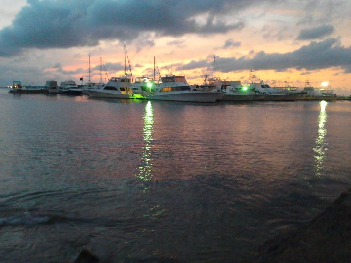 Atardecer Playa Sonrisa Puerto Cabello.